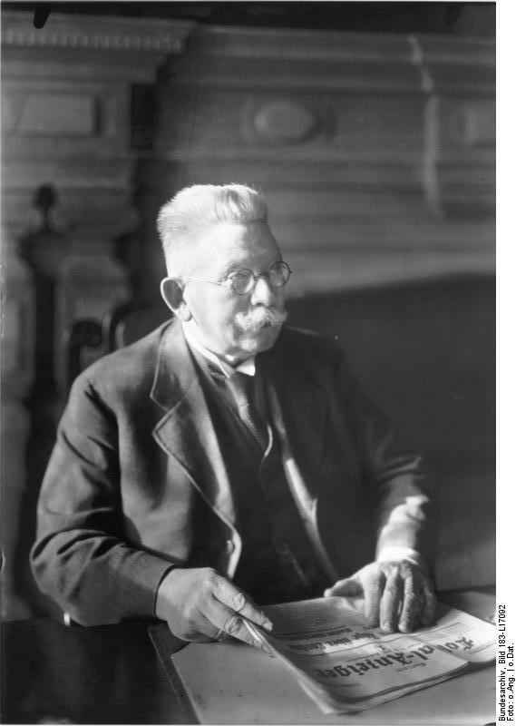 Hugenberg, Alfred geb.: 19.6.1865 in Hannover gest.: 12.3.1951 in Kükenbruch bei Rinteln 1891 Mitbegründer des Alldeutschen Verbandes; 1909-18 Generaldirektor des Krupp-Konzerns. 1914/16 begann er den Hugenbergschen Pressekonzern aufzubauen, der mit chauvinistischer und antikommunistischer Hetze an der ideologischen Vorbereitung des Faschismus beteiligt war. Hier mit seinem Massenblatt "Berliner Lokal-Anzeiger".